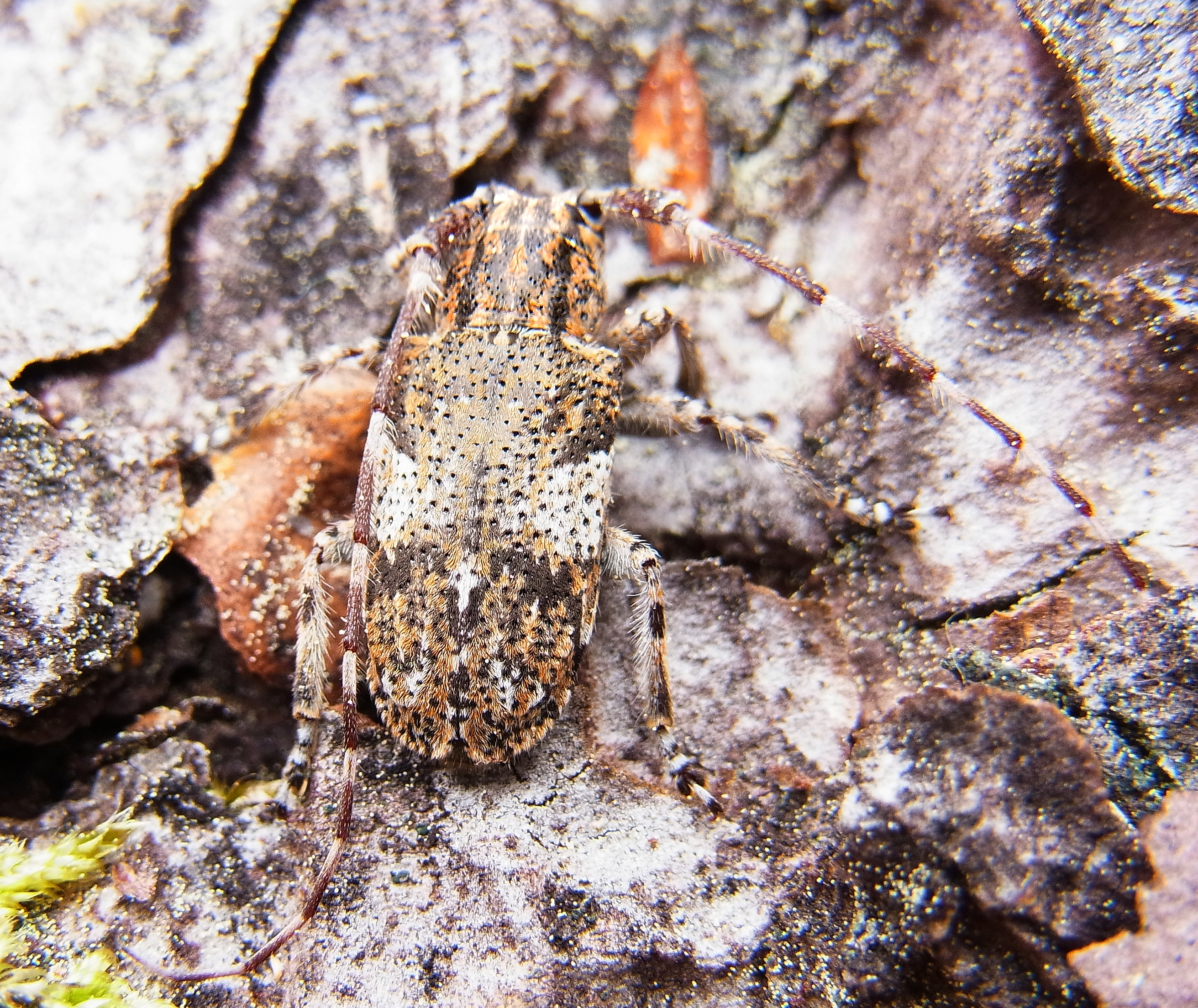 Mesosa nebulosa aus Frankreich 50 km nordöstlich von Bordeaux am 29.4.2013